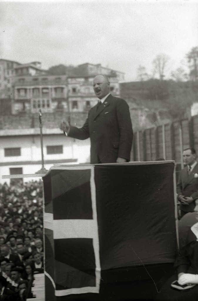 1933. urtean EAJk Donostian Atotxako Maitea pilotaleku zaharrean antolaturiko Aberri Eguna. Hizlari gisa Ewald Ammende ageri da. Argazkiaren originala Kutxa Fototekak kudeatzen du eta webgunean eta atarian erakusten du